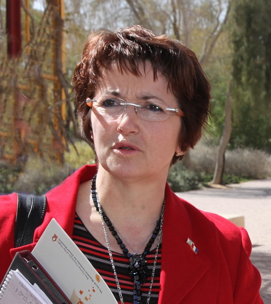 Christiane Lambert lors du voyage des agriculteurs français en Israël février 2012